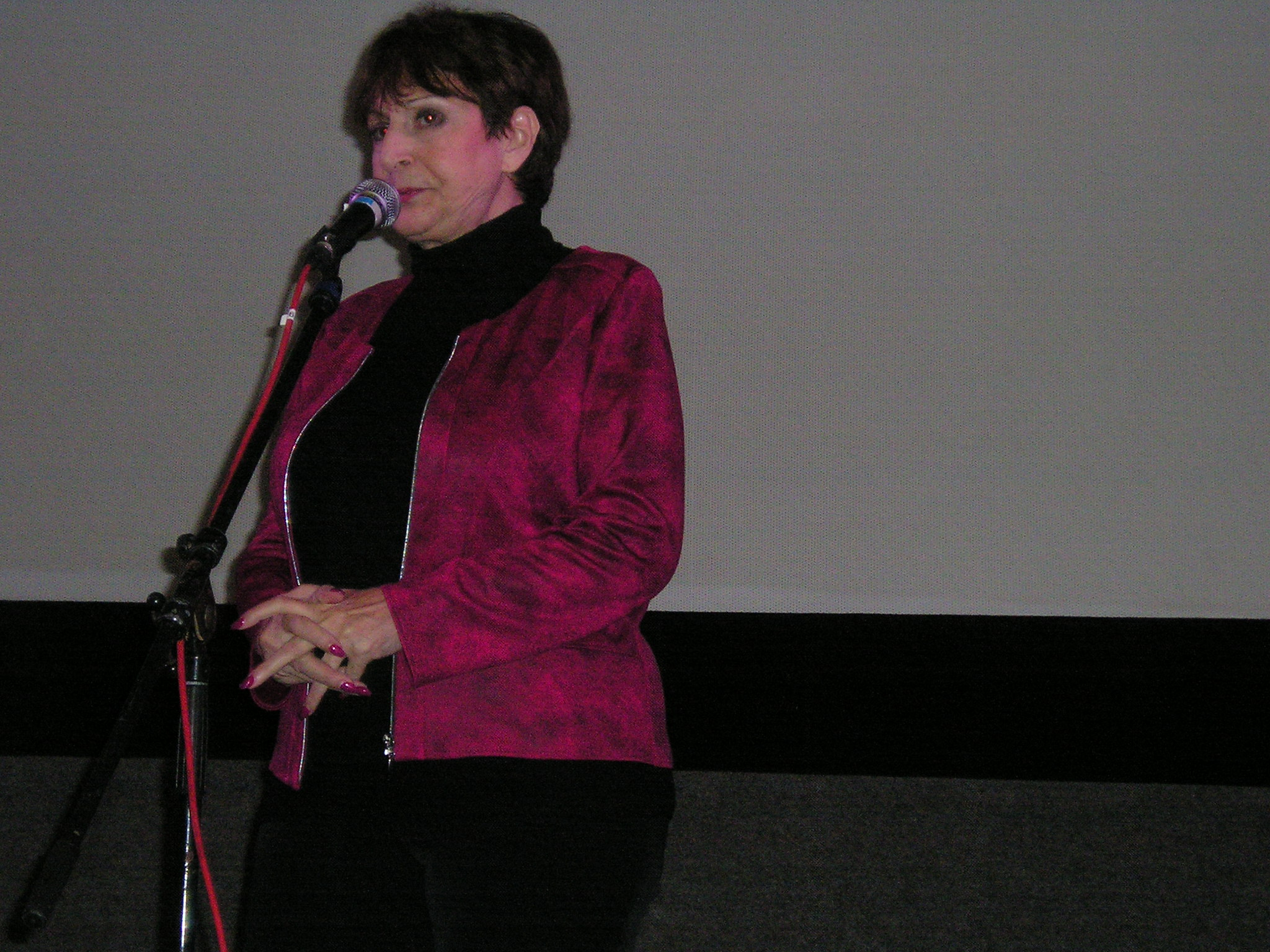 Tena Elefteriadu 2017